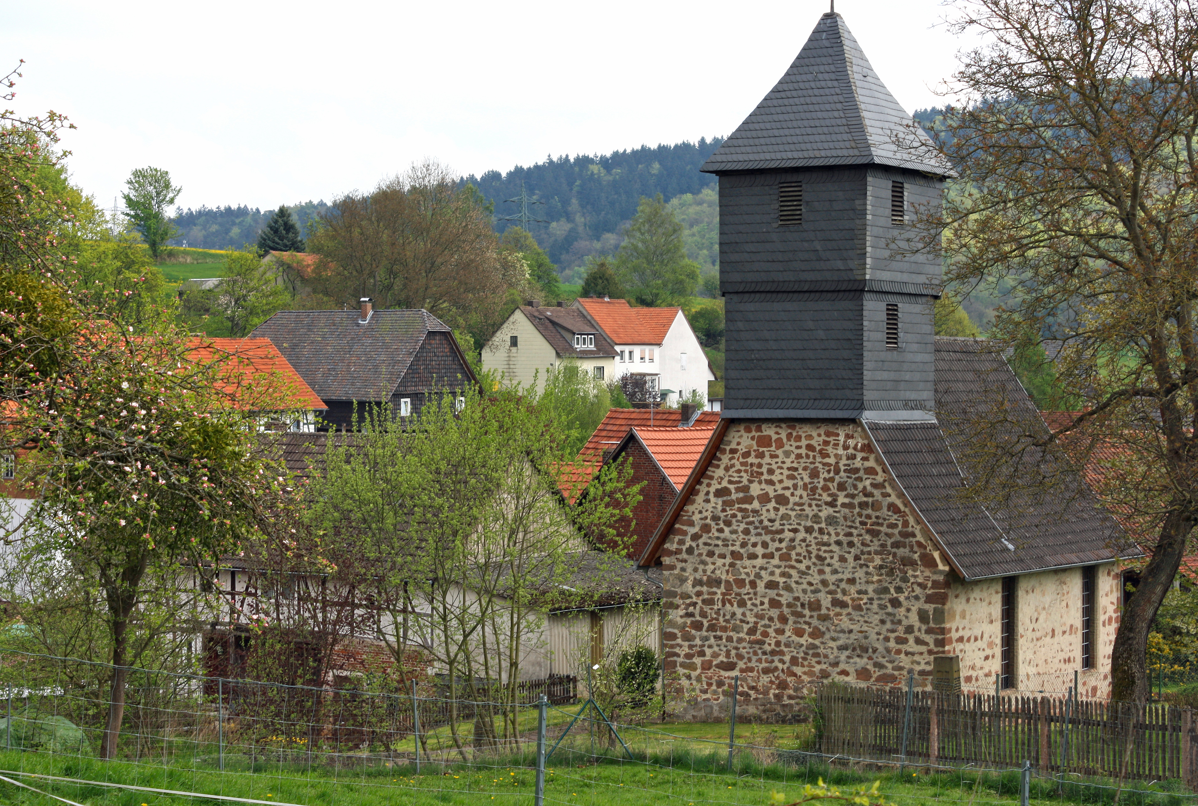 Die Kirche in Rodebach. Ursprünglich romanische Dorfkirche aus grob behauenen Natursteinen. Bis 2007 umfangreich saniert. Schmiedeeiserne Fenster mit zu Beginn der Industrialisierung maschinengefertigten Profilen. Infos beim ev. Pfarramt Germerode.